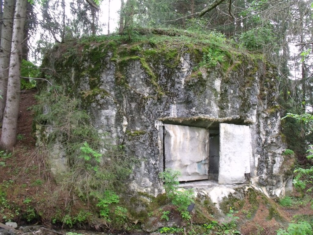 Opera 22.1 Versciaco